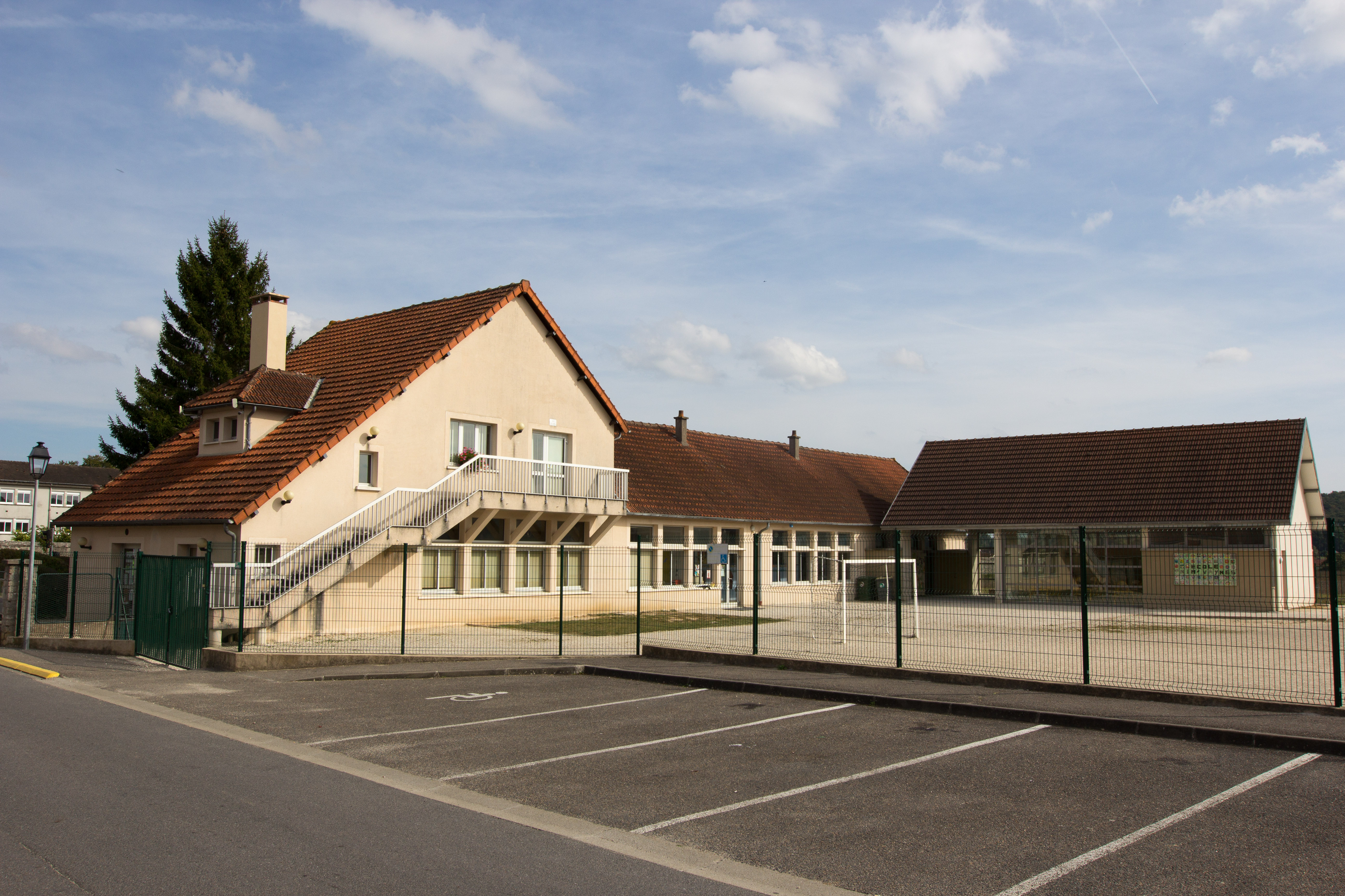 Mairie et école de Vayres-sur-Essonne / Vayres-sur-Essonne / Essonne / France